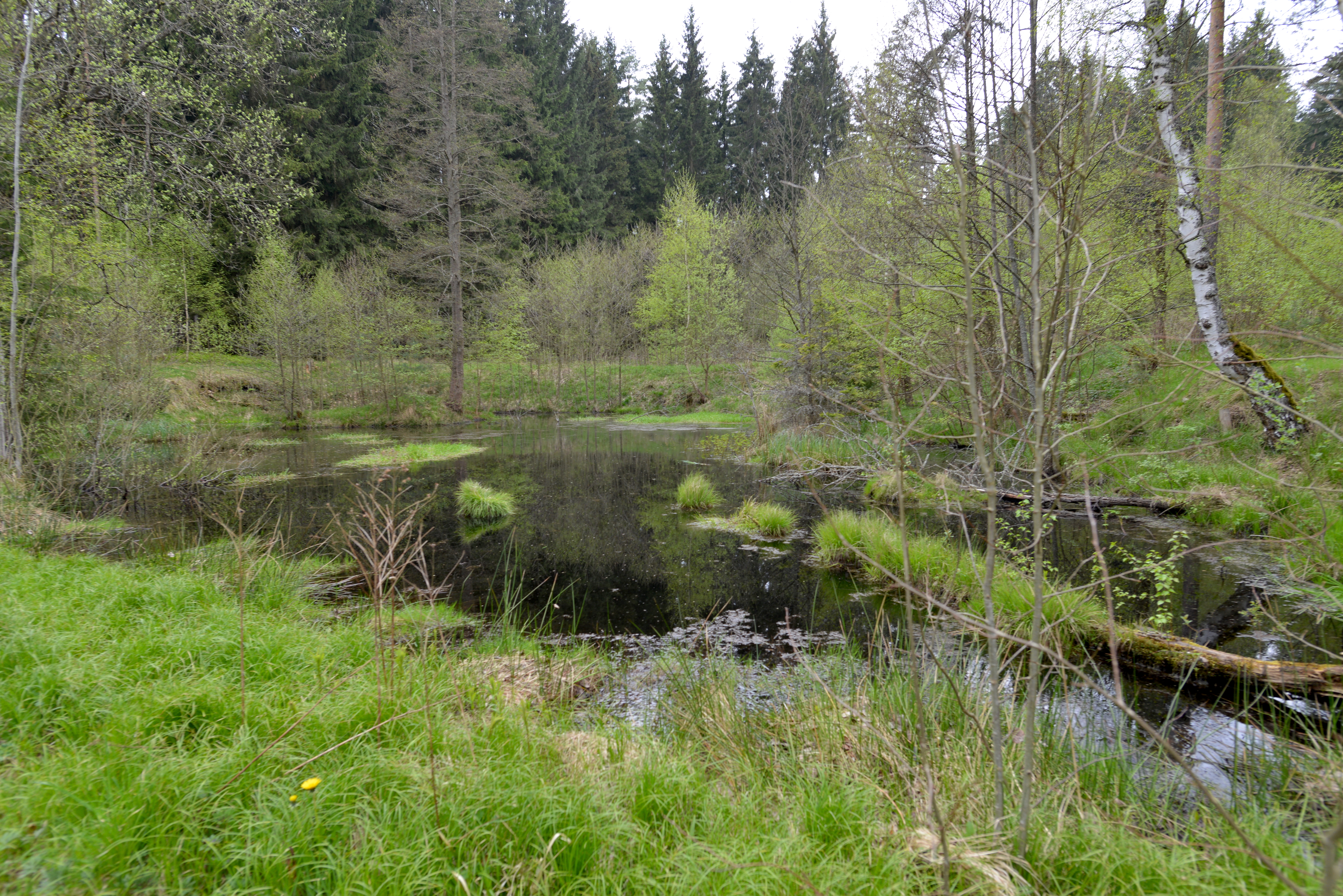 (NSG:BY-NSG-00346.01)_Egertal bei Neuhaus